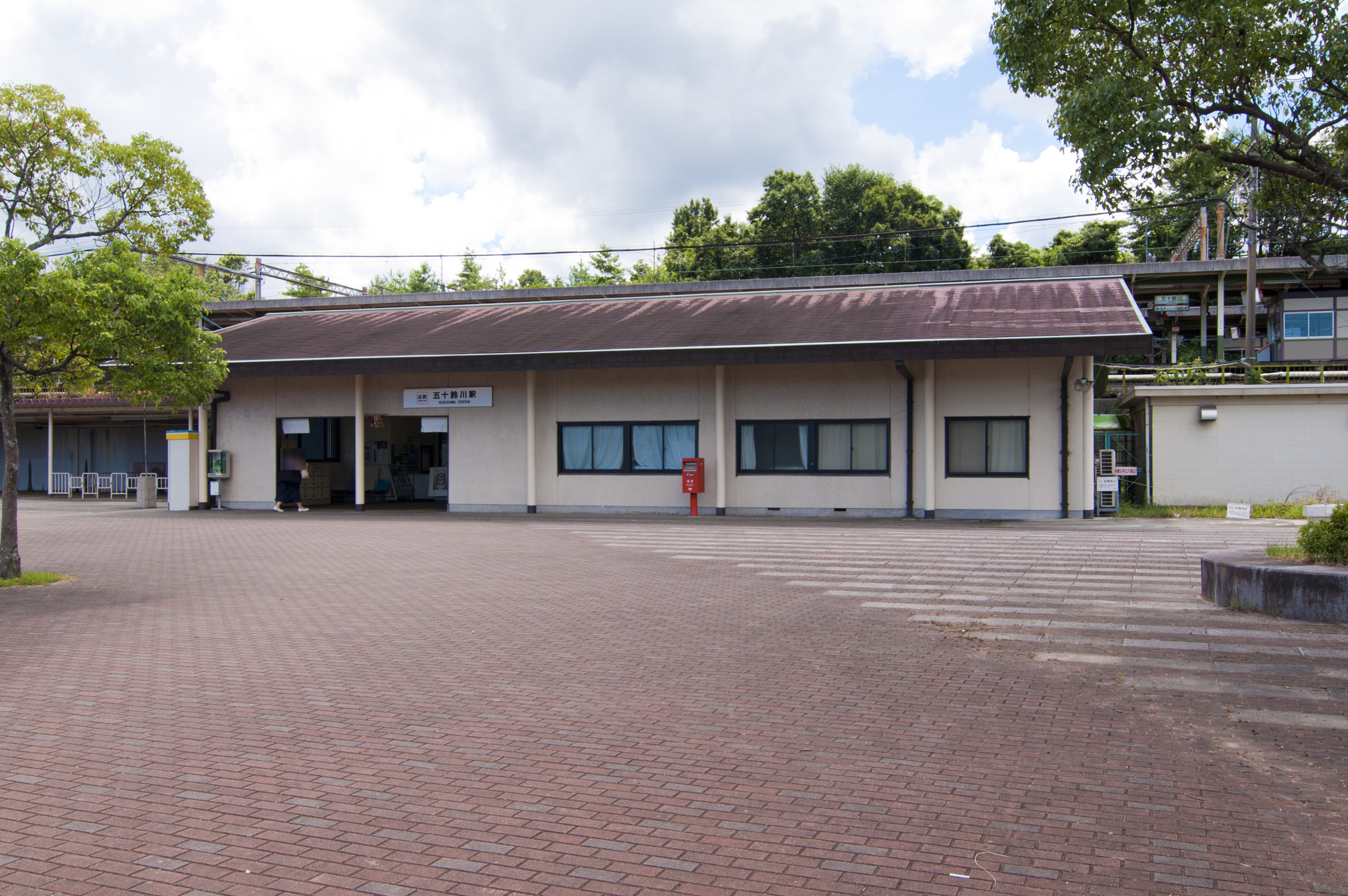 近畿日本鉄道鳥羽線 五十鈴川駅